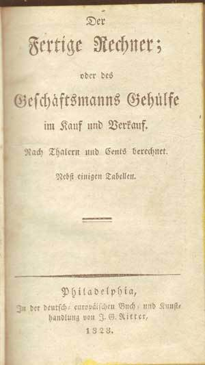 Der Fertige Rechner, Philadelphia 1828